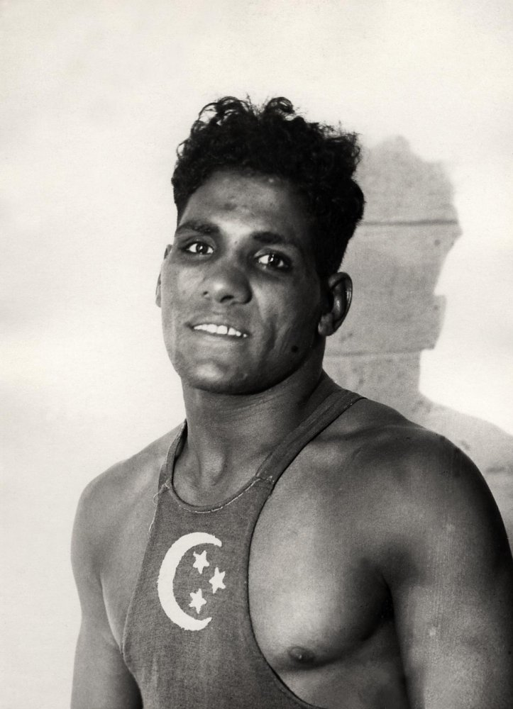 Sport, Olympische Spelen Amsterdam, 1928: De Egyptenaar Ibrahim Moustafa, olympisch kampioen Grieks / Romeins worstelen tot 82,5 kg.